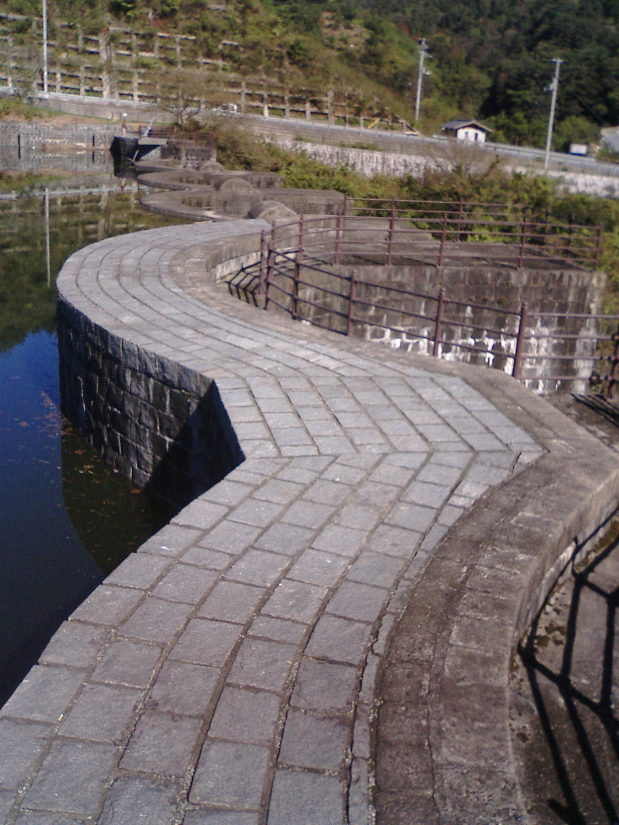 豊稔池ダム - 日本国香川県観音寺市